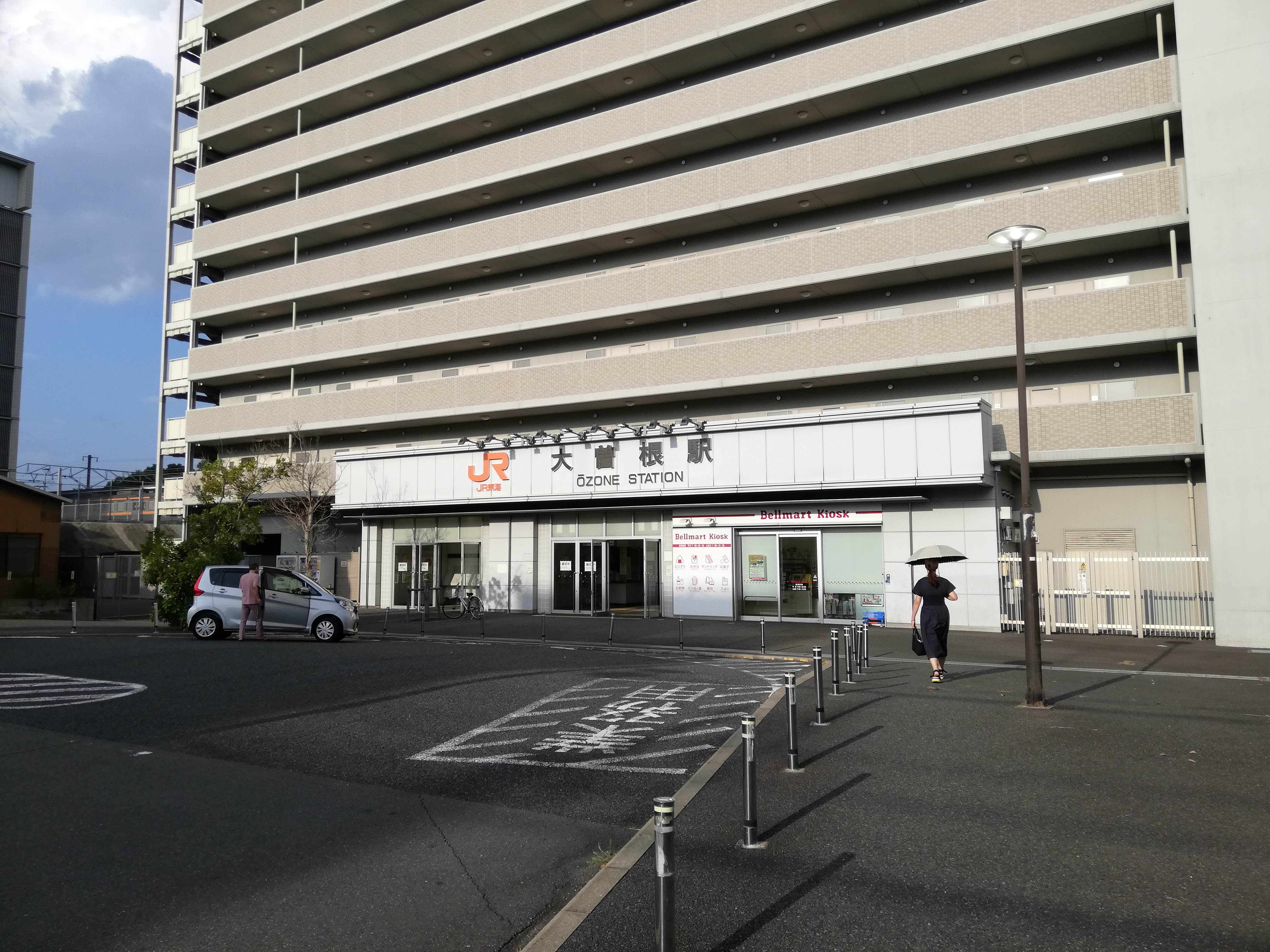 中央本線の大曽根駅駅舎南口。